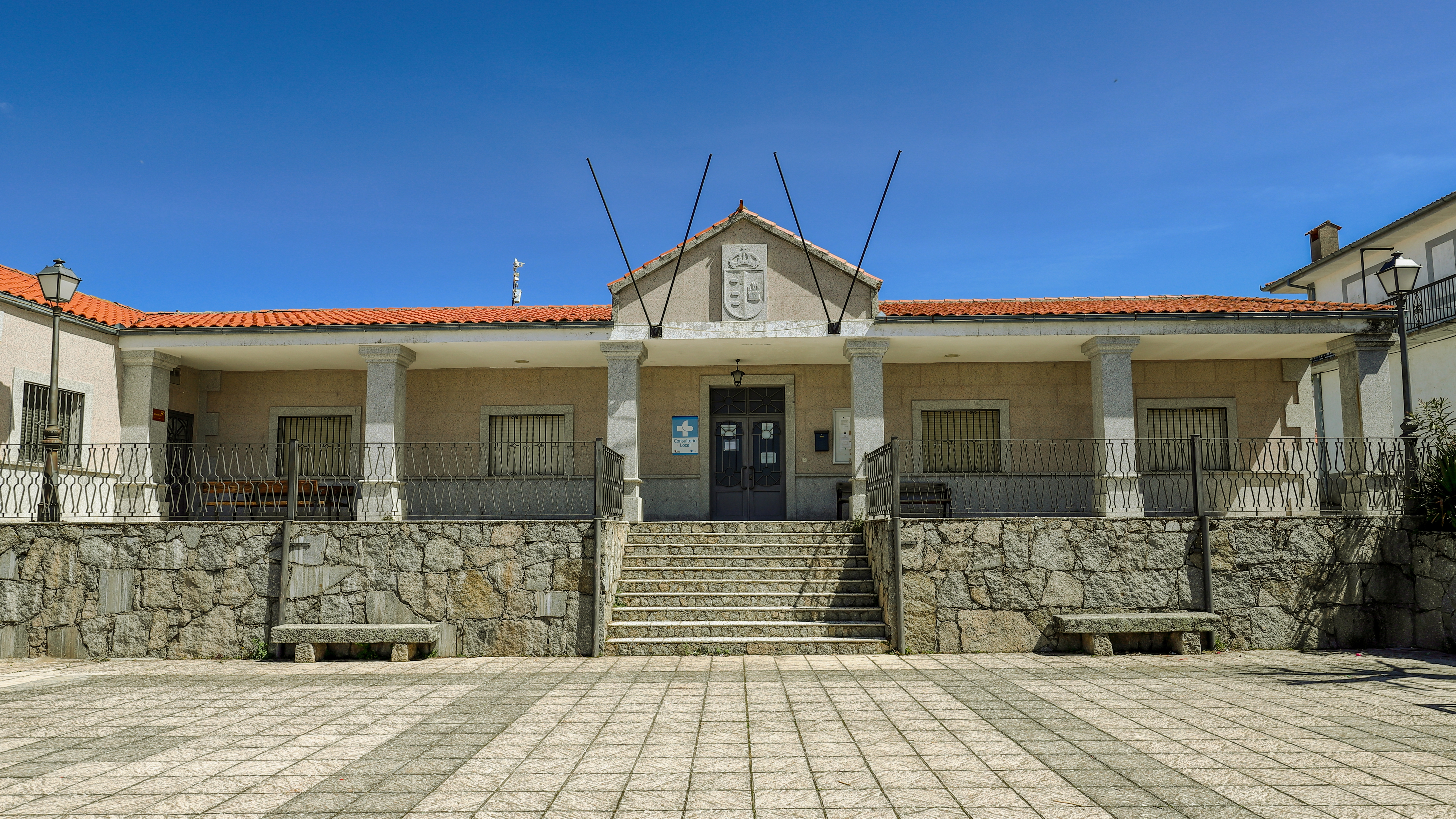 Guijo de Ávila es un municipio de la comarca Alto Tormes, provincia de Salamanca.